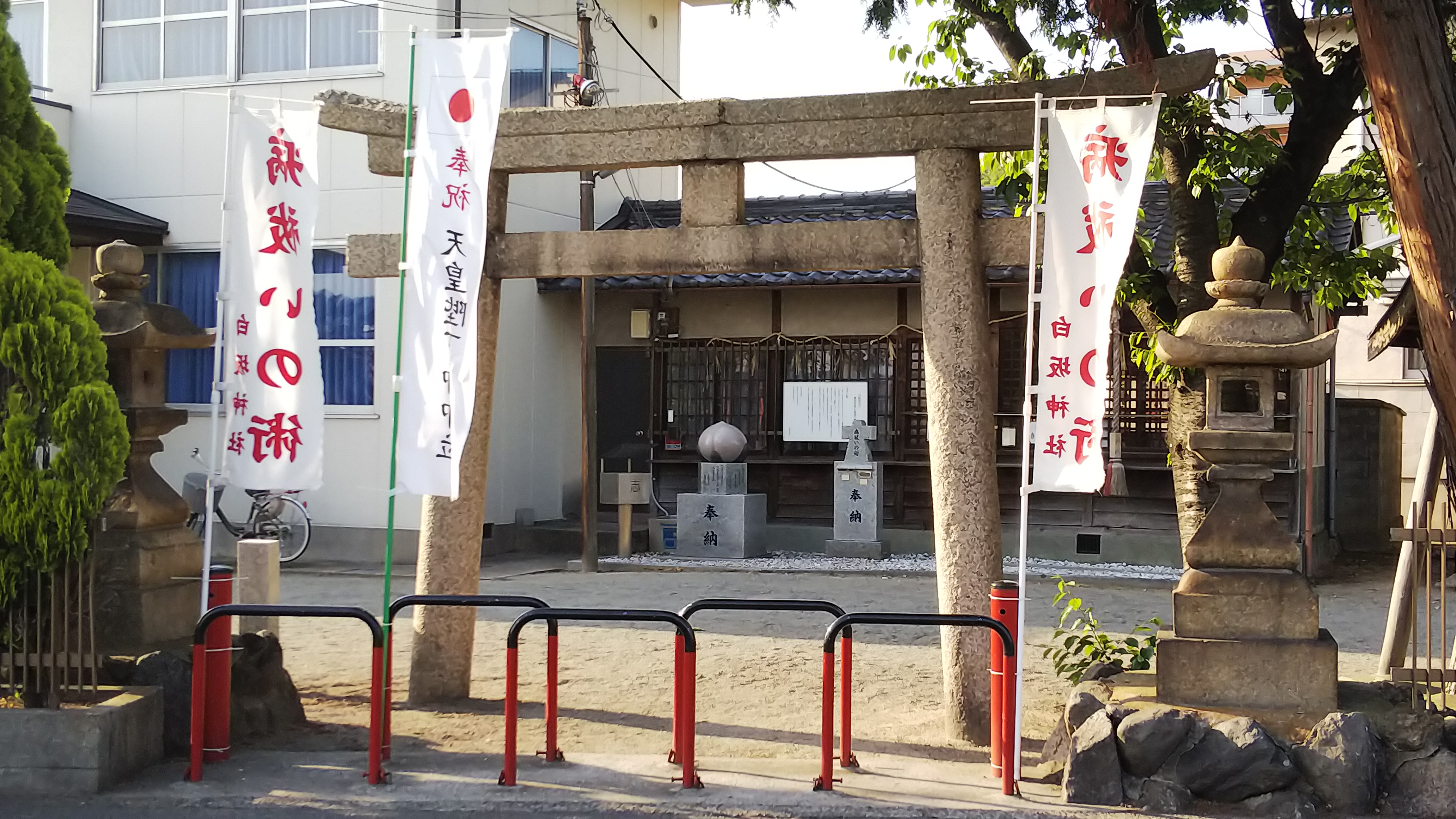 宿奈川田神社（白坂神社）鳥居